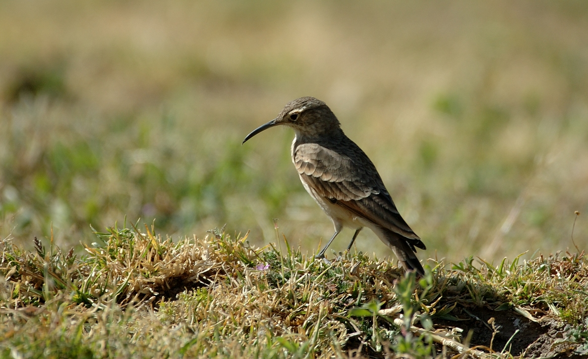 Slender-billed Miner (Geositta tenuirostris). Chiguata, Arequipa, Peru 17.06.08